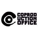 Logo, Coproduction Office